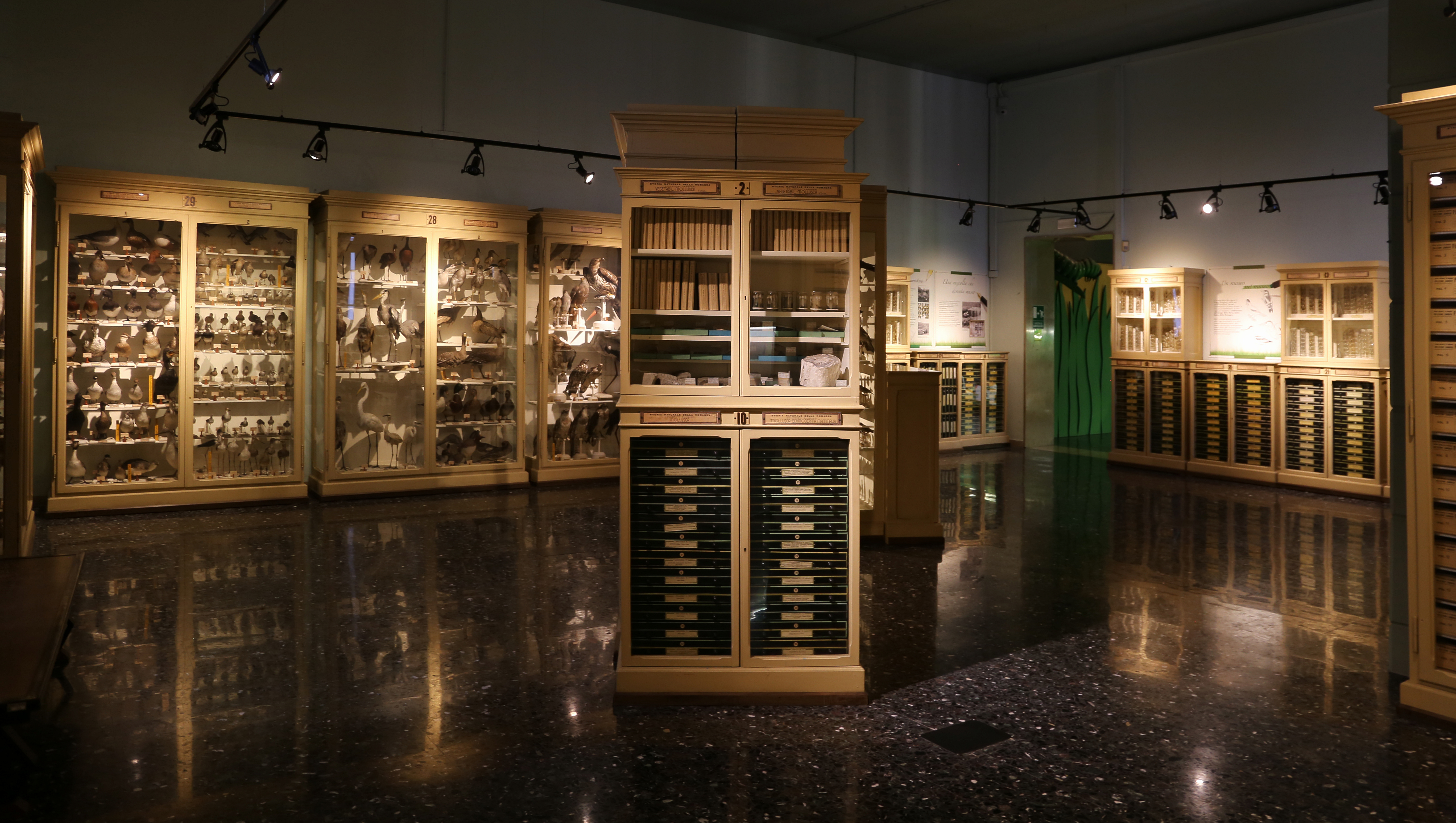 Museo civico di storia naturale di Verona This is a photo of a monument which is part of cultural heritage of Italy.